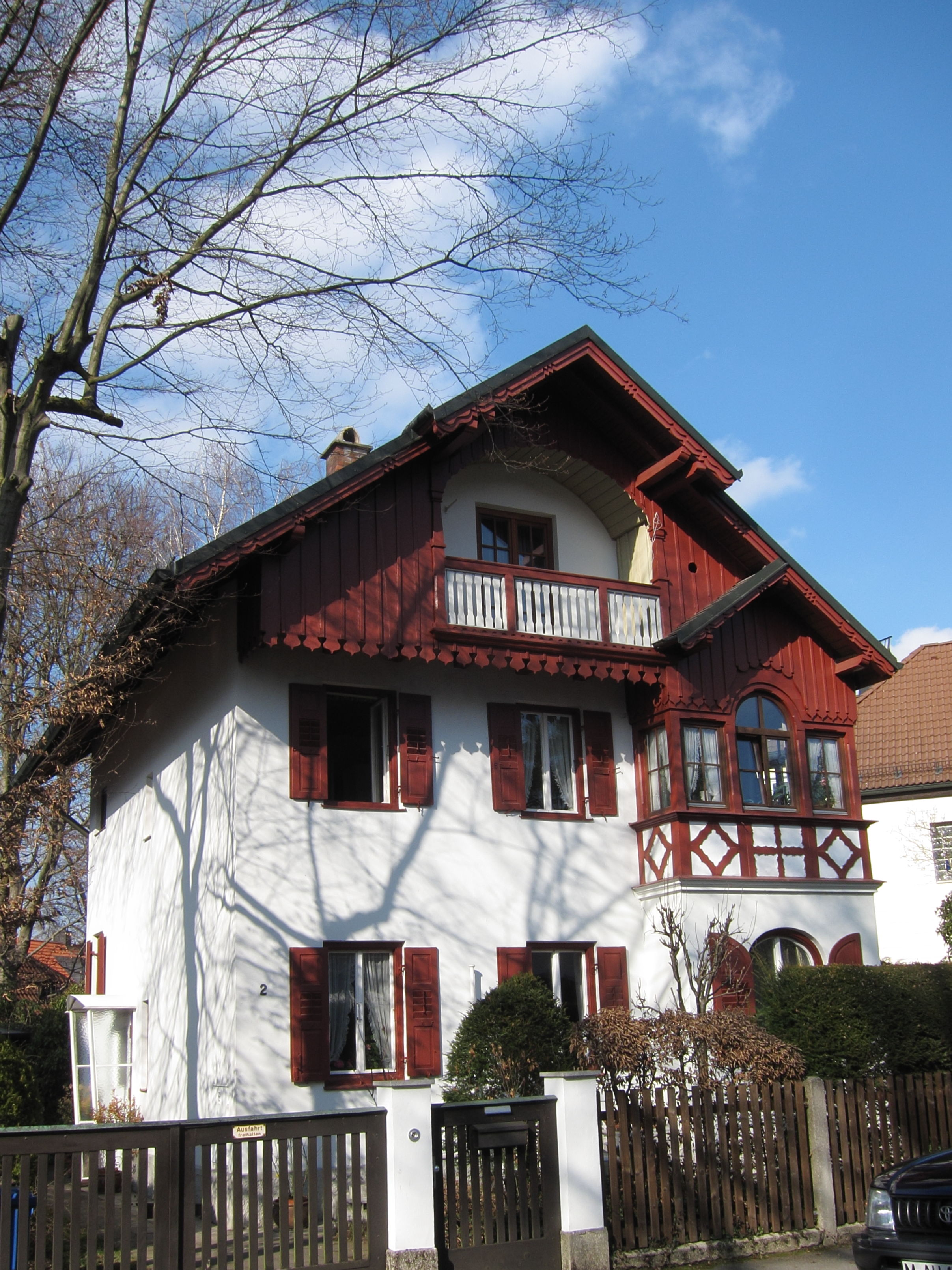 Apfelallee 2; Villa, Landhausstil, Fachwerk, um 1900.